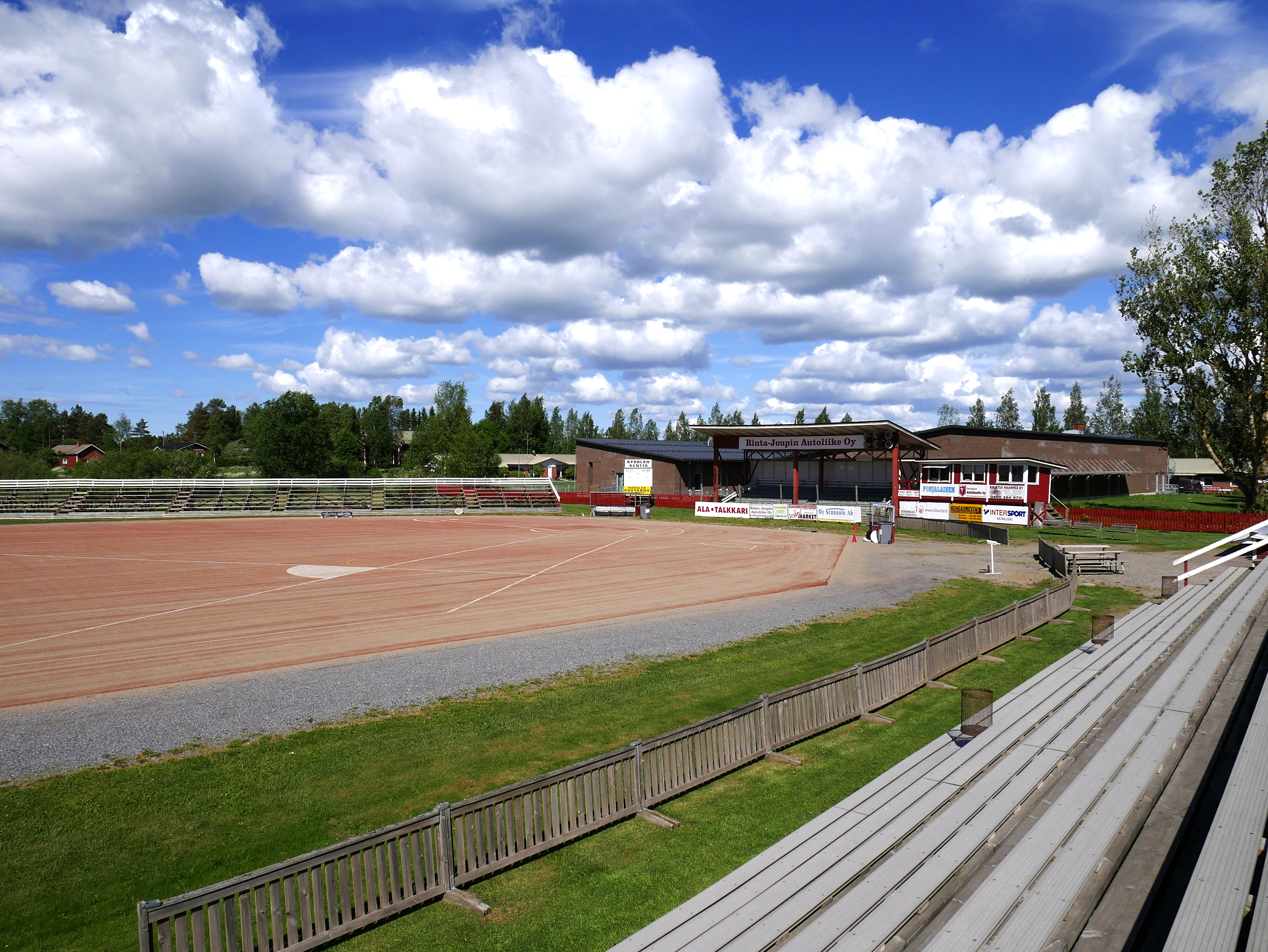 Kyrölän pesäpallokenttä Vähässäkyrössä.